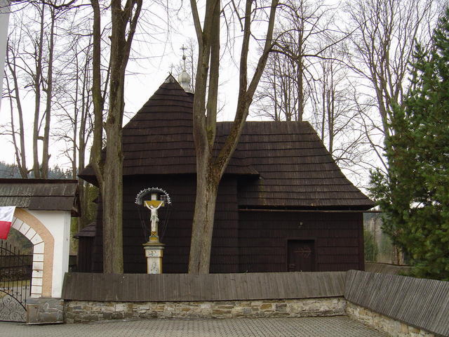 Drevený kostol v Jurgove. Odfotil Kristián Slimák 09.04.2005. Kategória:Obrázky budov Kategória:Presunúť na Commons